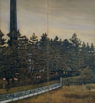 絵画 「松並木」